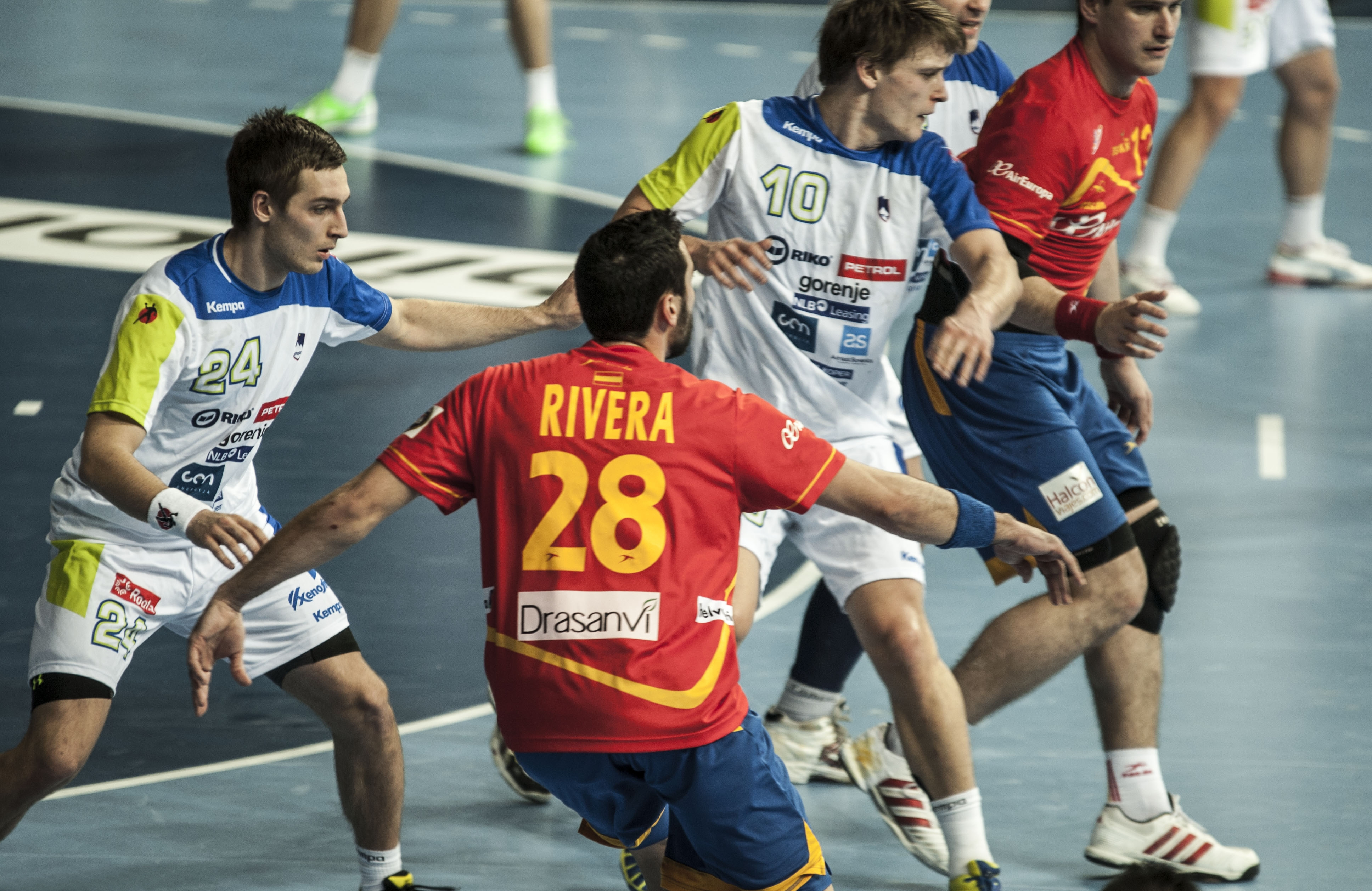 España-Eslovenia